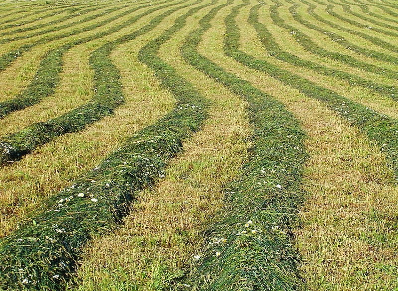 Värskelt niidetud heinapõlt Eestis, Jõgeva maakonnas.